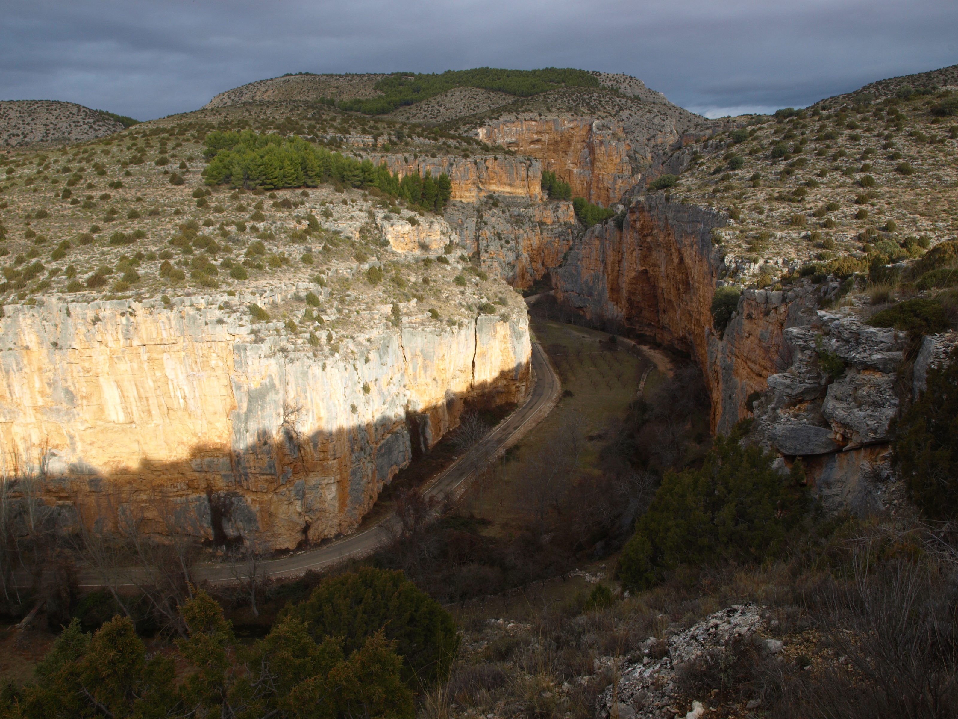 Hoces del Río Mesa This is a photography of a Site of Community Importance in Spain with the ID: ES2430105. Natura2000 entry, EEA entry